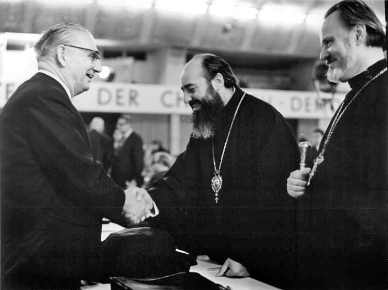 Zentralbild Liebers 2.10.68 Erfurt: 12. Parteitag der CDU Der Staatssekretär für Kirchenfragen der DDR, Hans Seigewasser (l.), begrüßte auf dem Parteitag den Erzbischof Wladimir, Exarch des Moskauer Patriarchen in Mitteleurope (M.) und den Erzpriester Jewgeni Misasjuk, Sekretär des mitteleuropäischen Exarchiats der russischen orthodoxen Kirche (r.).